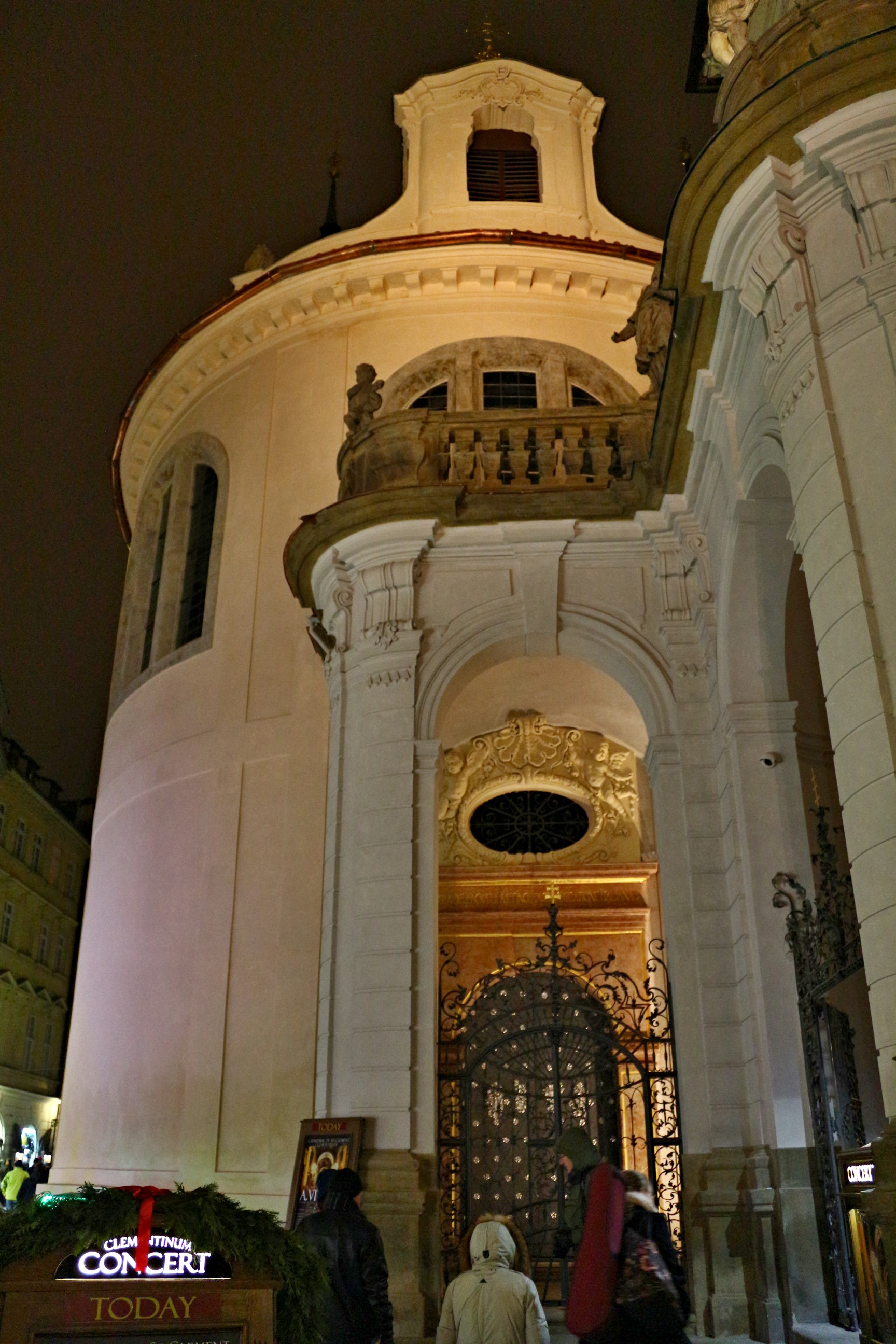 Vlašská kaple Nanebevzetí Panny Marie v Klementinu, Karlova ulice